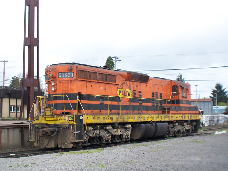 Diesellocomotive X 1851 P&WLocomotive